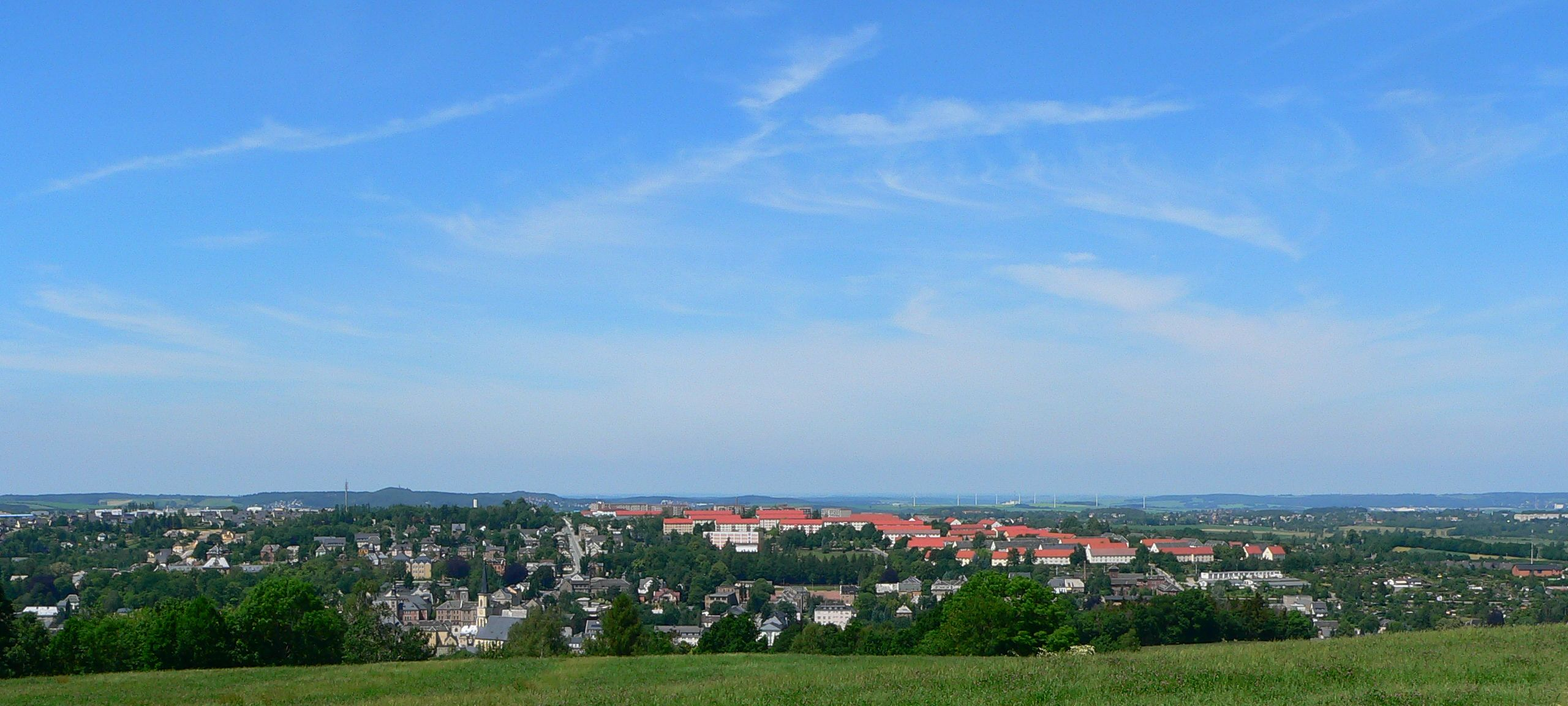 Blick über das im Tal gelegene Stollberg auf das Vorerzgebirge Richtung Hohenstein-Ernstthal wobei man in der Mitte den Aussichtsturm der Deutschlandschachthalde über Oelsnitz Erzgebirge erkennt.